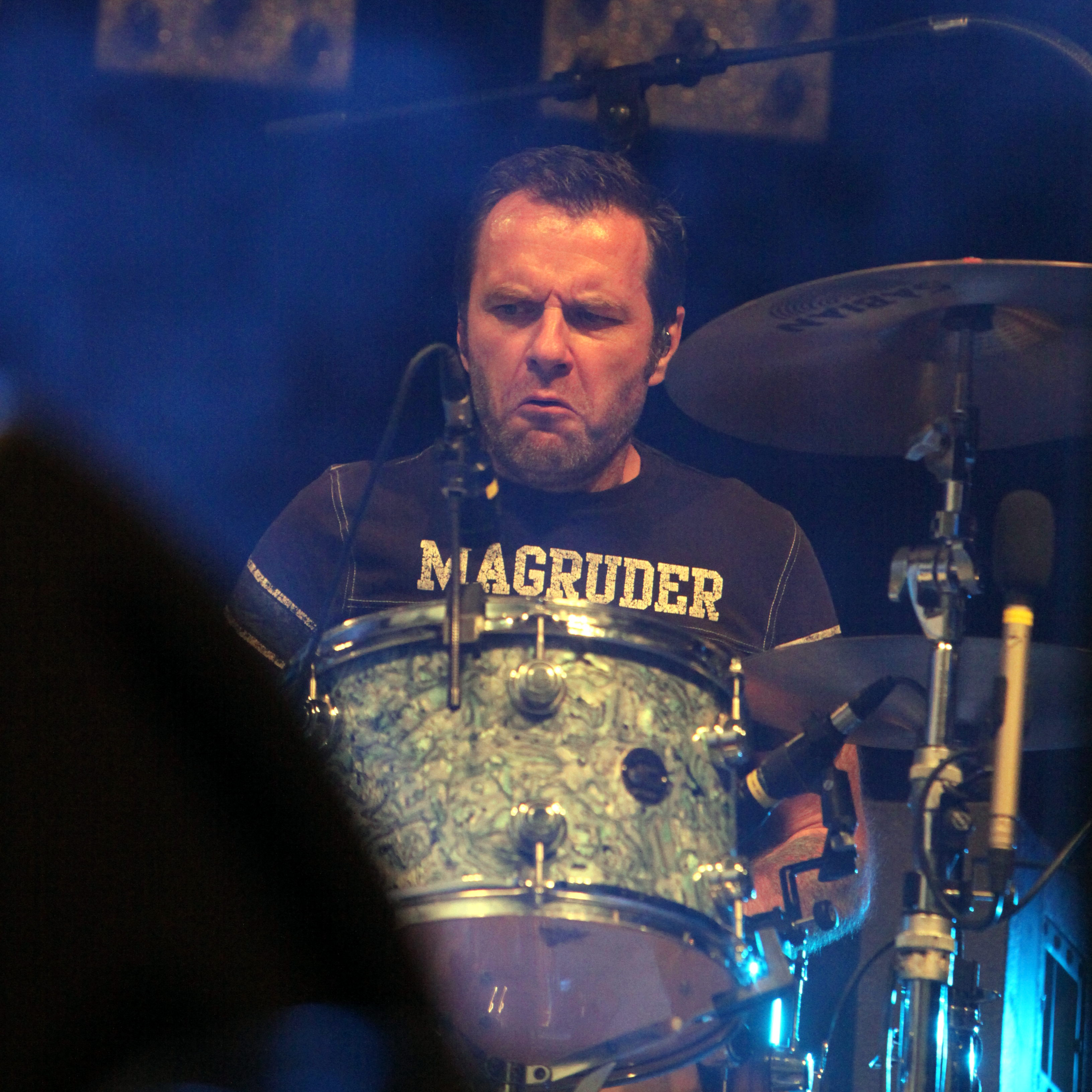 Niko (Les Wampas) at Balelec 2011